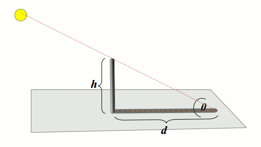 חישוב אורך הצל על פי זוית מקור האור